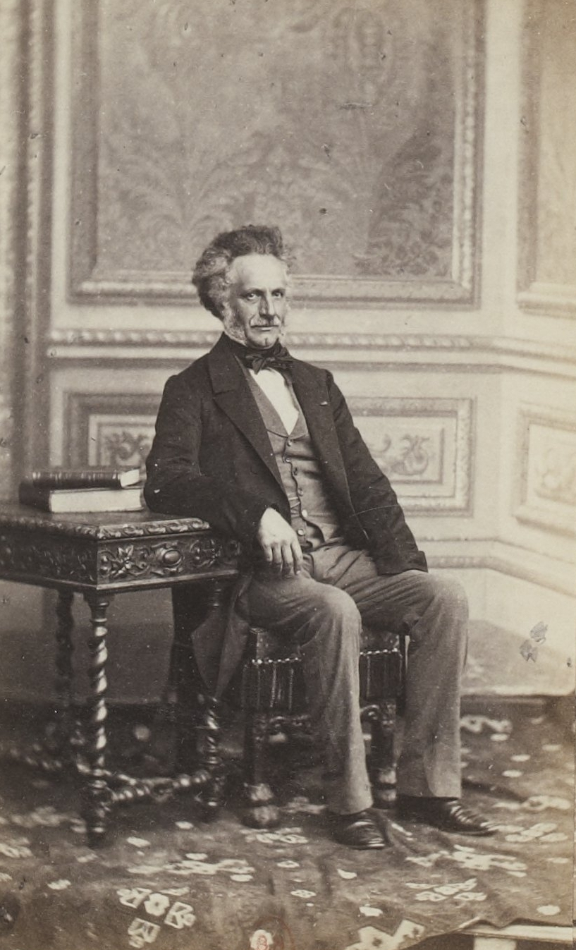 Album des députés au Corps législatif entre 1852-1857.